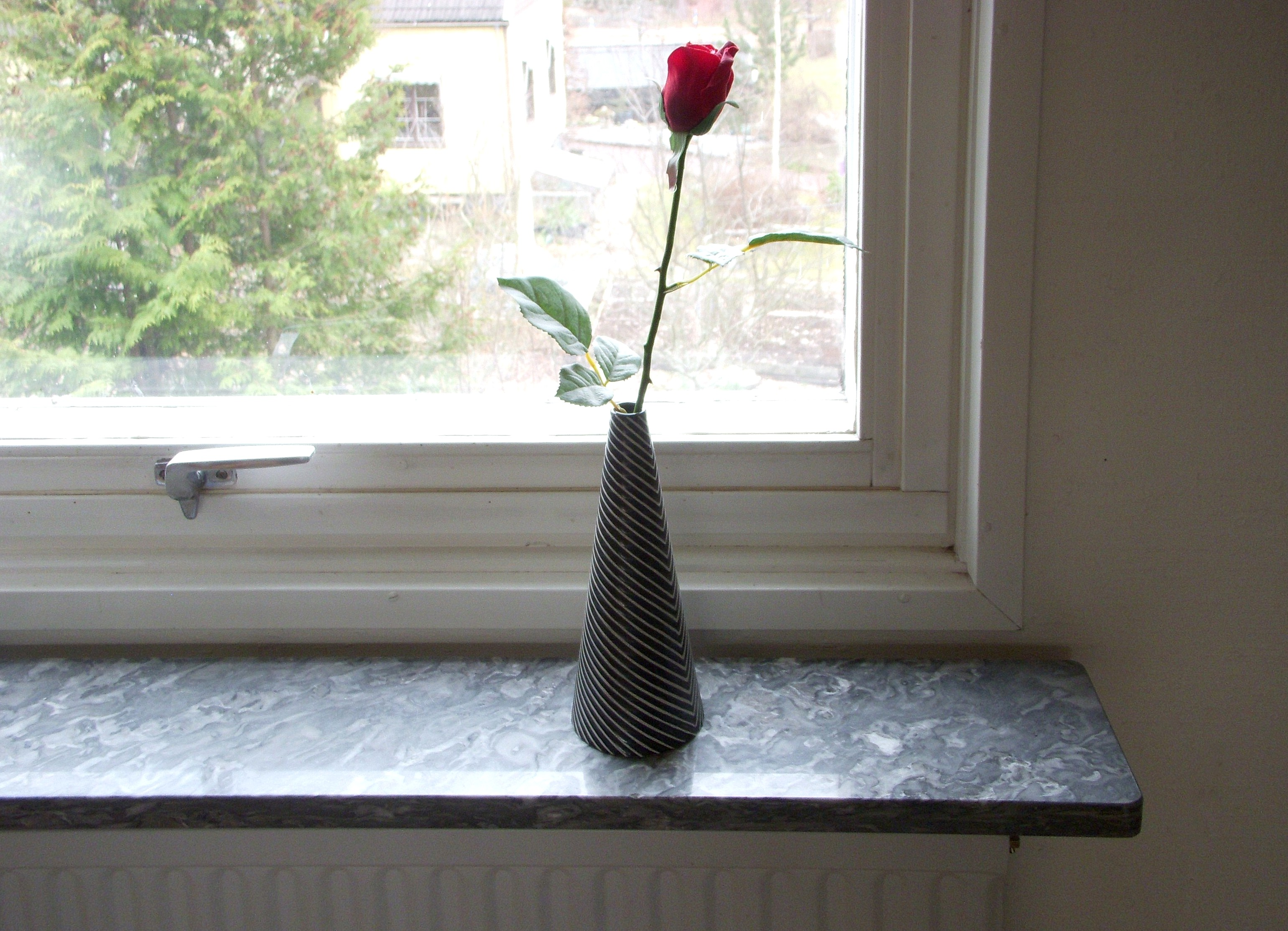 Exempel för en friliggande fönsterbänk